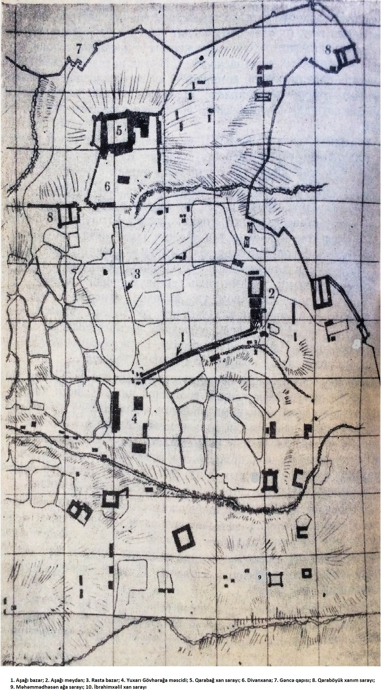 Şuşa qalasının və tarixi mərkəzinin planı